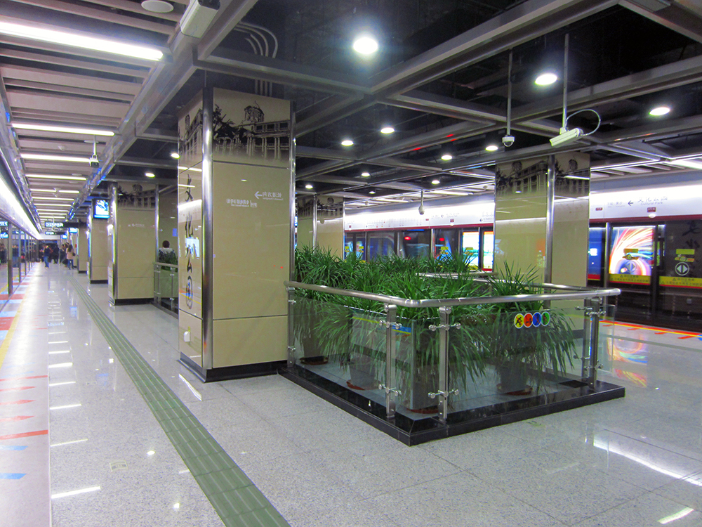 文化公園站站台換乘節點